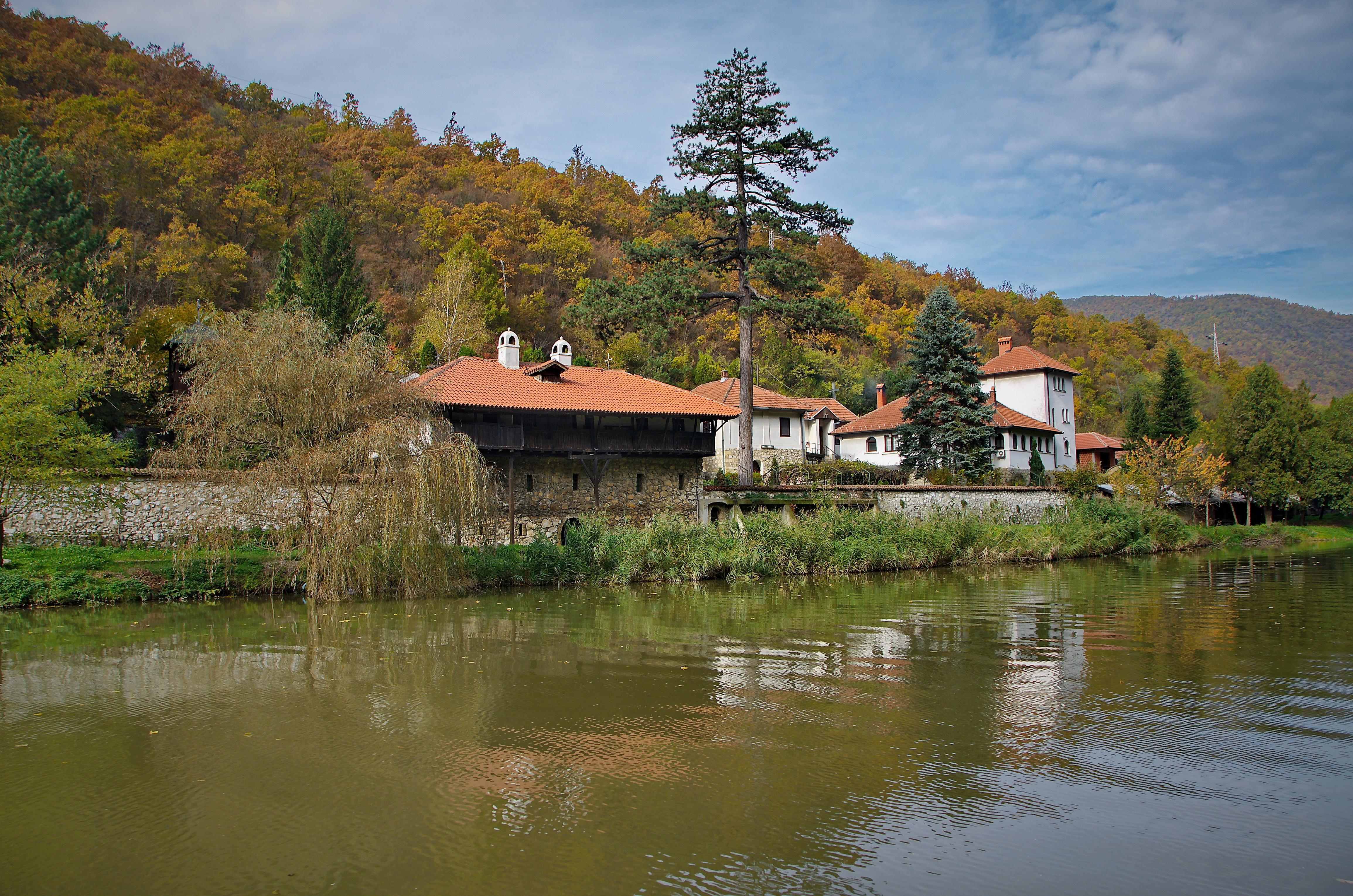 У манастирској ризници чува се више икона и рукописних књига, међу којима је највредније Каранско јеванђеље из 1608. године.